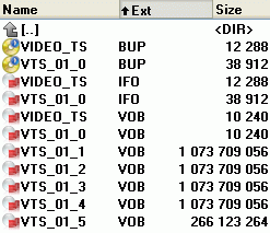 Типичная файловая структура диска DVD-Video.